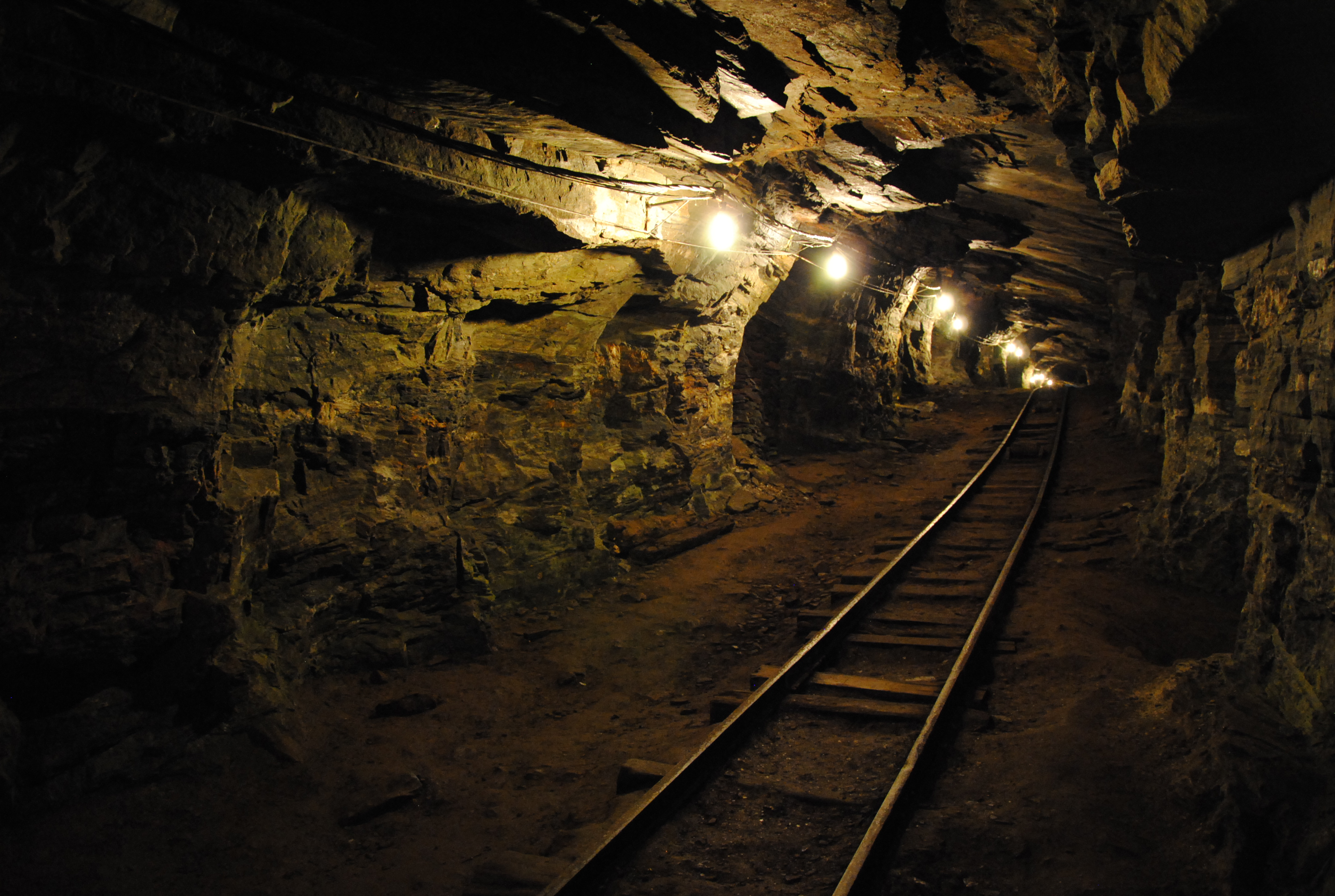 Passagem gold mine. Mariana (MG).